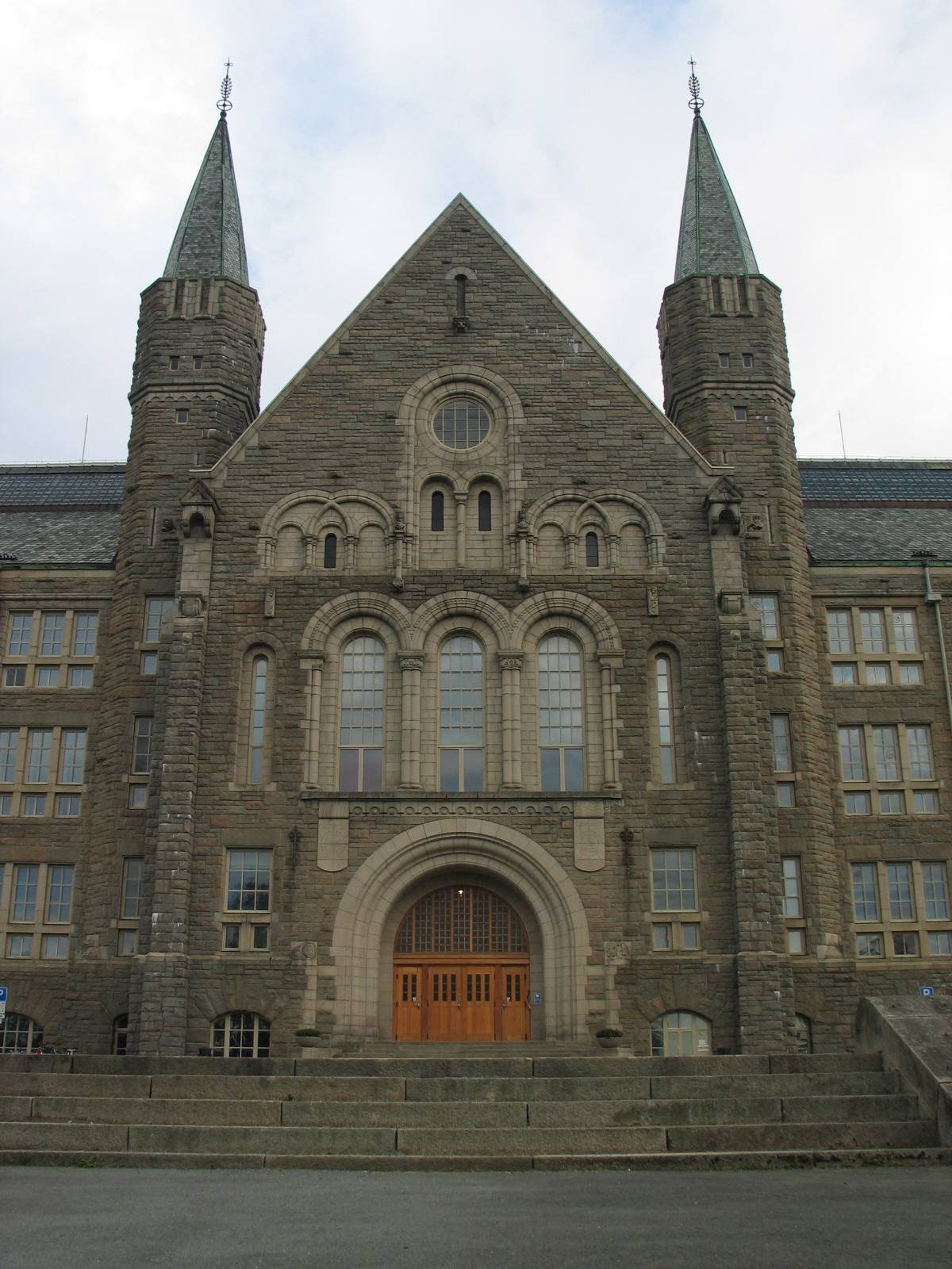 NTNU in Trondheim